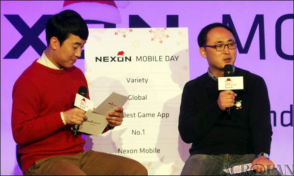 넥슨 모바일데이 Vol.5 : 2015년도 결산 및 새해 계획 발표